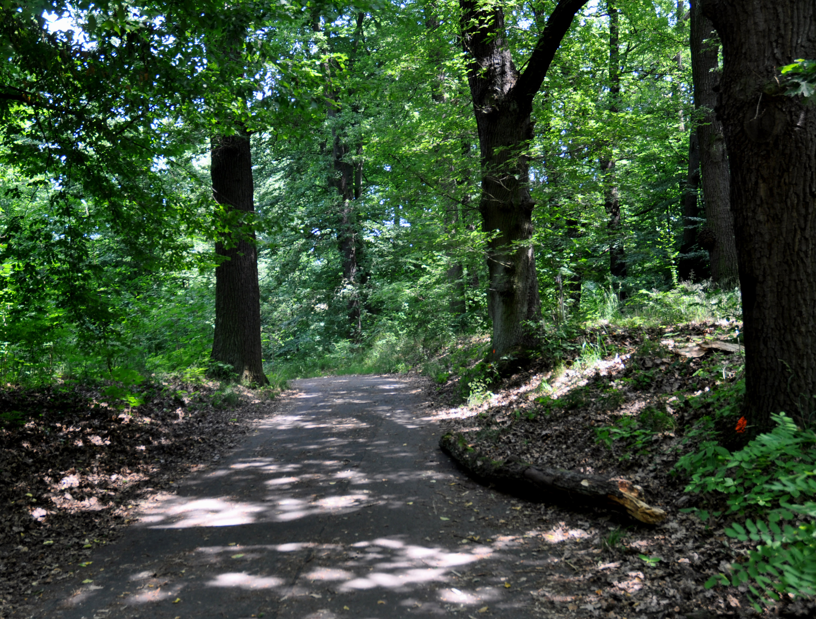 Drive mit Eichenbeständen nahe dem Jägerhof